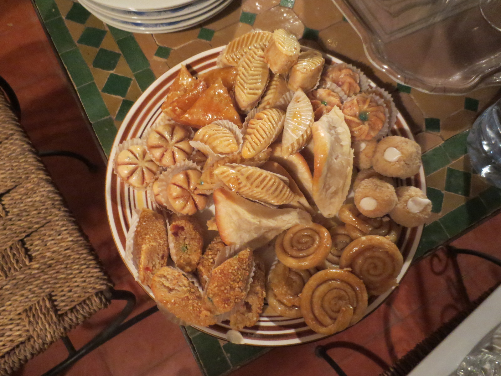 Pastries of Morocco